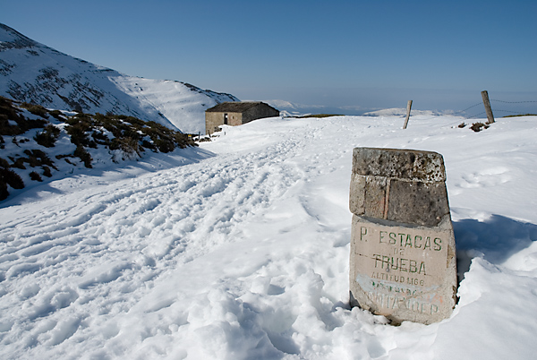 Estaca de Trueba